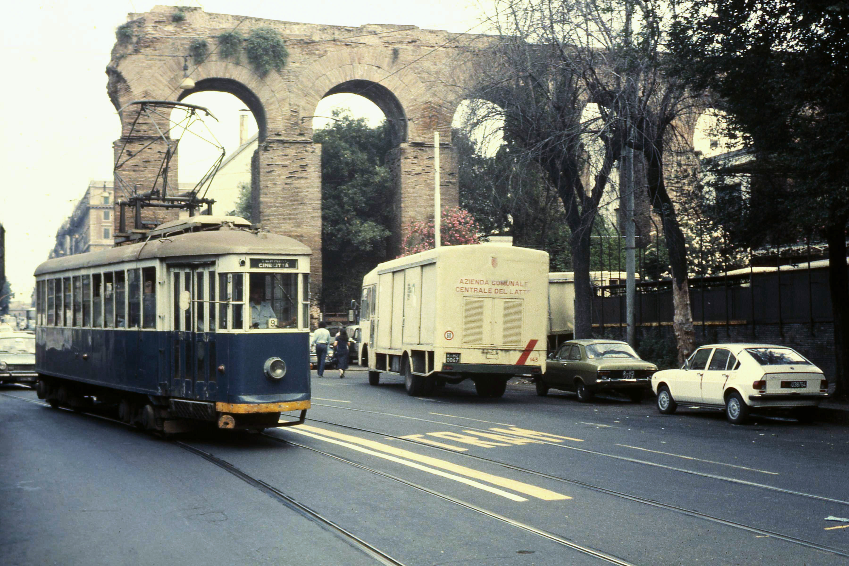 Tram naar Cinecittá in 1979